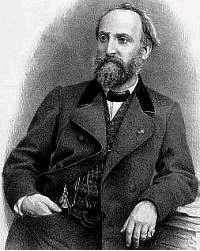 Antoine-François Marmontel (1816-1898), French composer, pianist, pedagogue